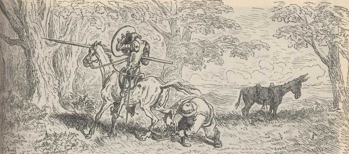 Sancho Pança prende as patas de Rocinante